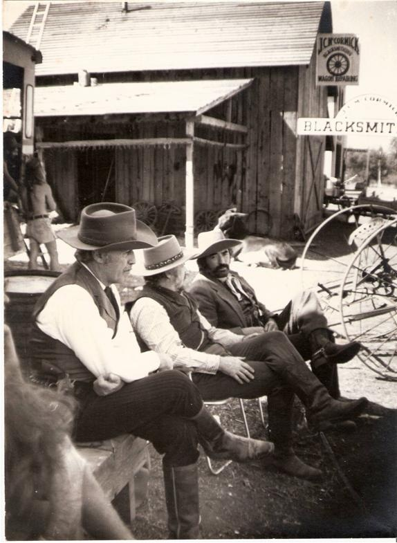 סרט-ביקי שני כובעים עם גרגורי פק